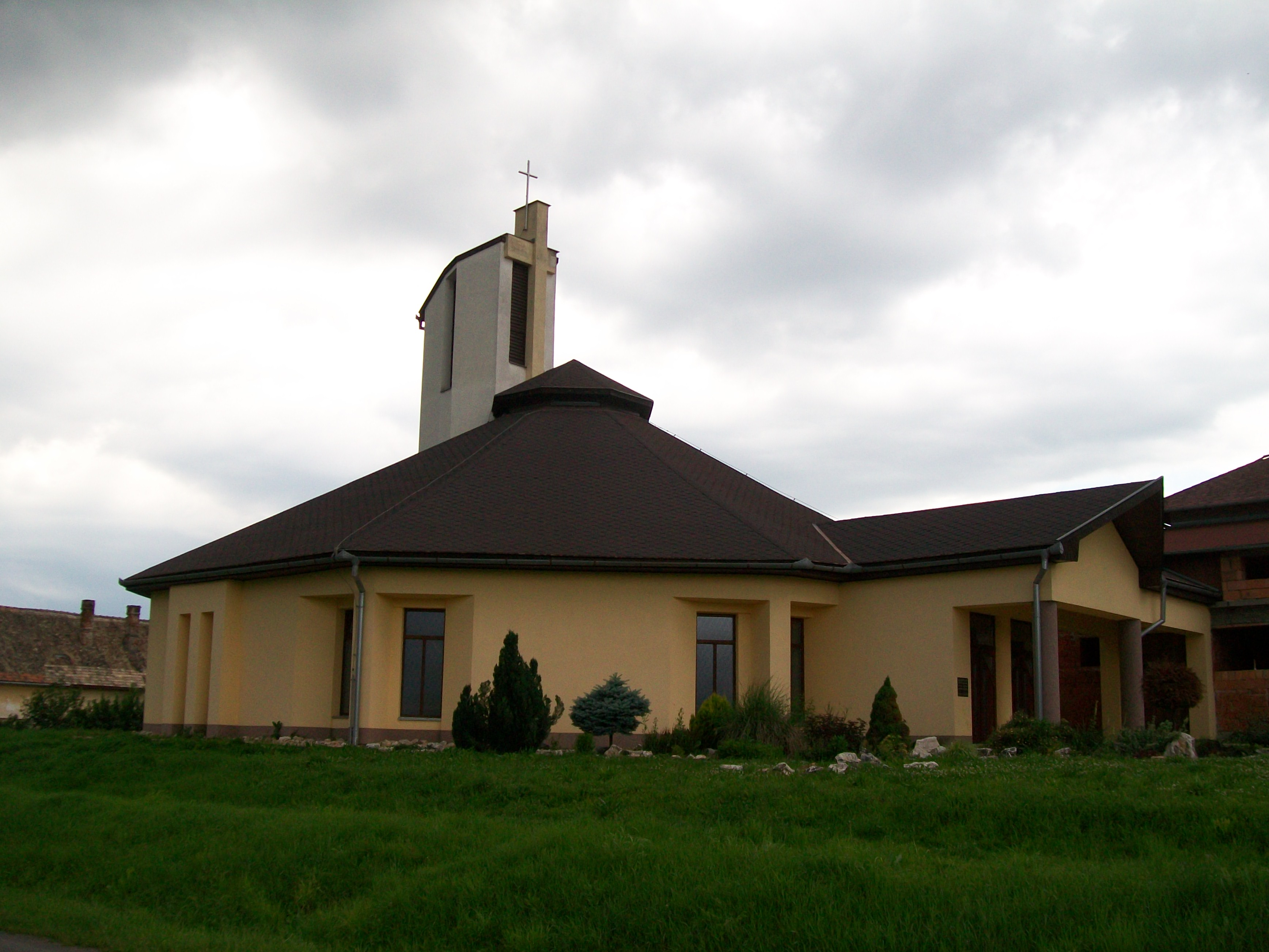 Farský Kostol Sviatosti Oltárnej v obci Buzitka (okr. Lučenec)